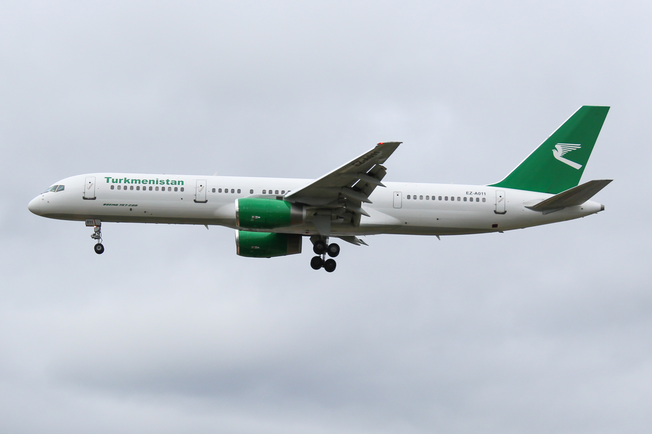 EZ-A011 Boeing 757 Turkmenistan-2